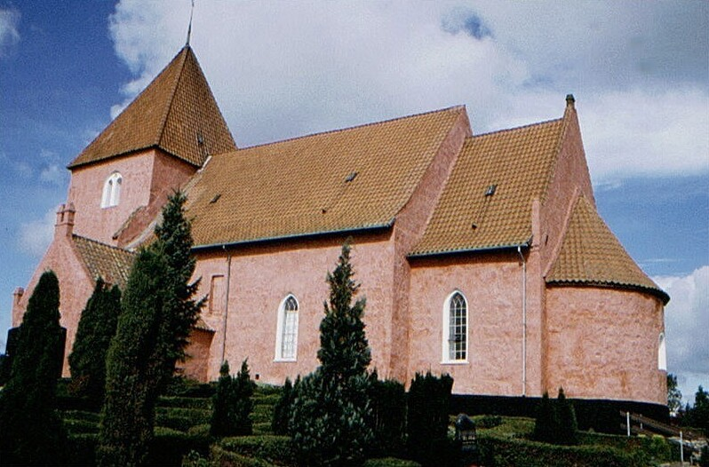 Tingsted Kirke i Danmark. Tingsted kirke